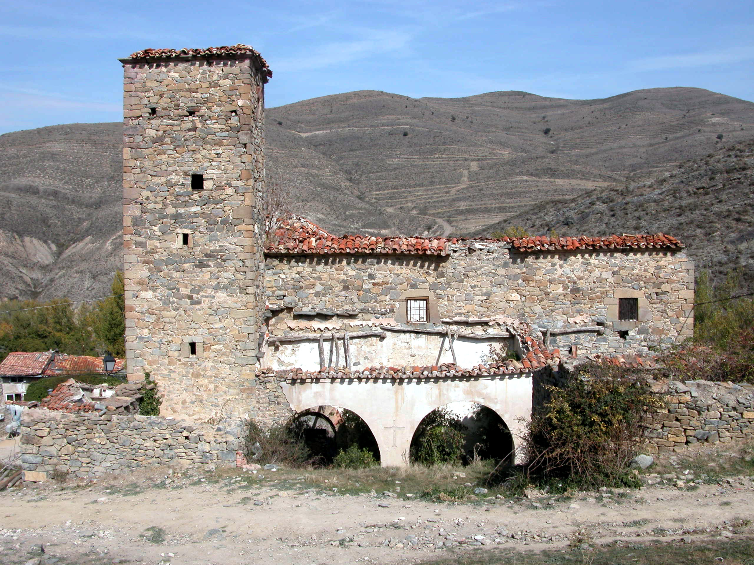 Ruinas de la iglesia de la Concepción en Poyales (Enciso - La Rioja - España).